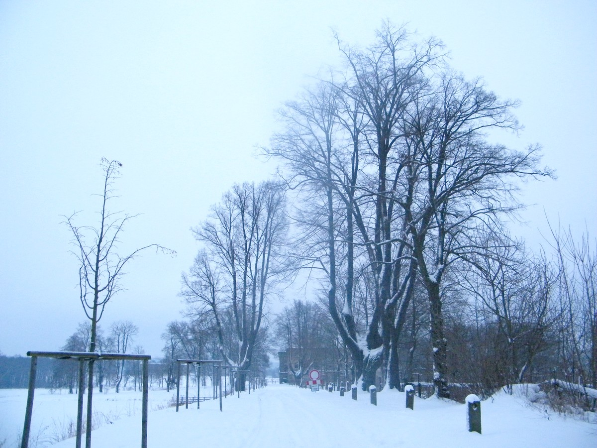 Lipová alej v Lipové směrem k zámku